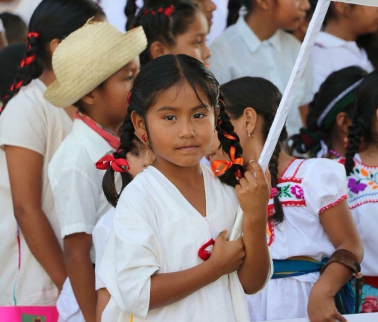 Niña Zapoteca